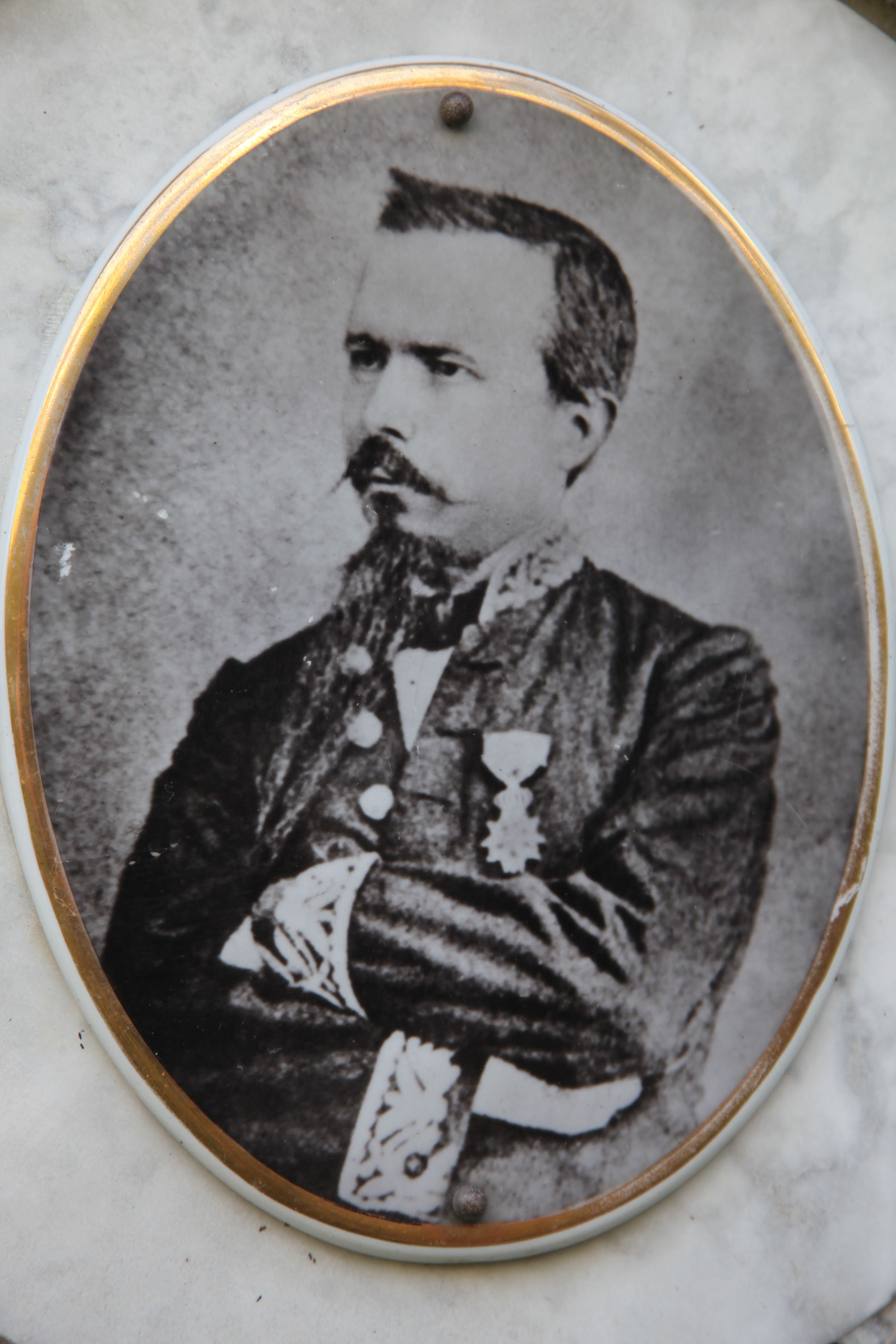 Portrait de Guillaume sur son cénotaphe à Plouégat-Guérand